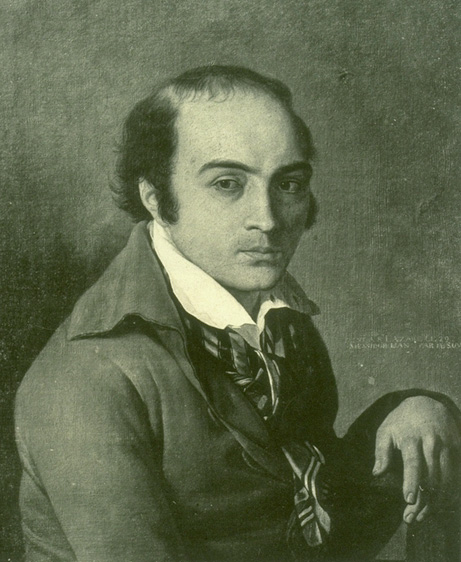 André Chénier (1762-1794) lors de son incarcération